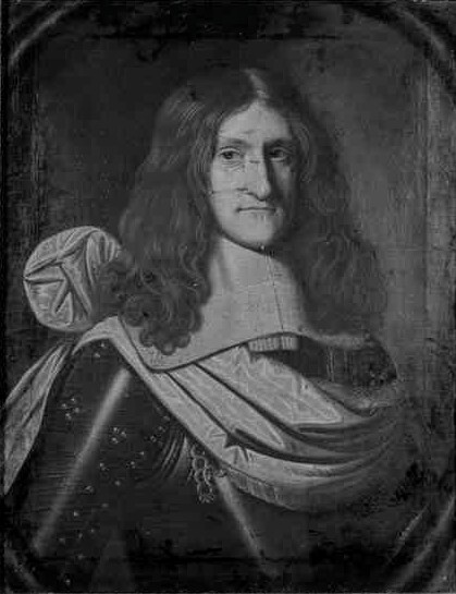 Bildnis des hessischen Prinzen Landgraf Georg III. von Hessen-Itter (1632—1676)